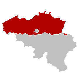 Kaart van Vlaams Gewest